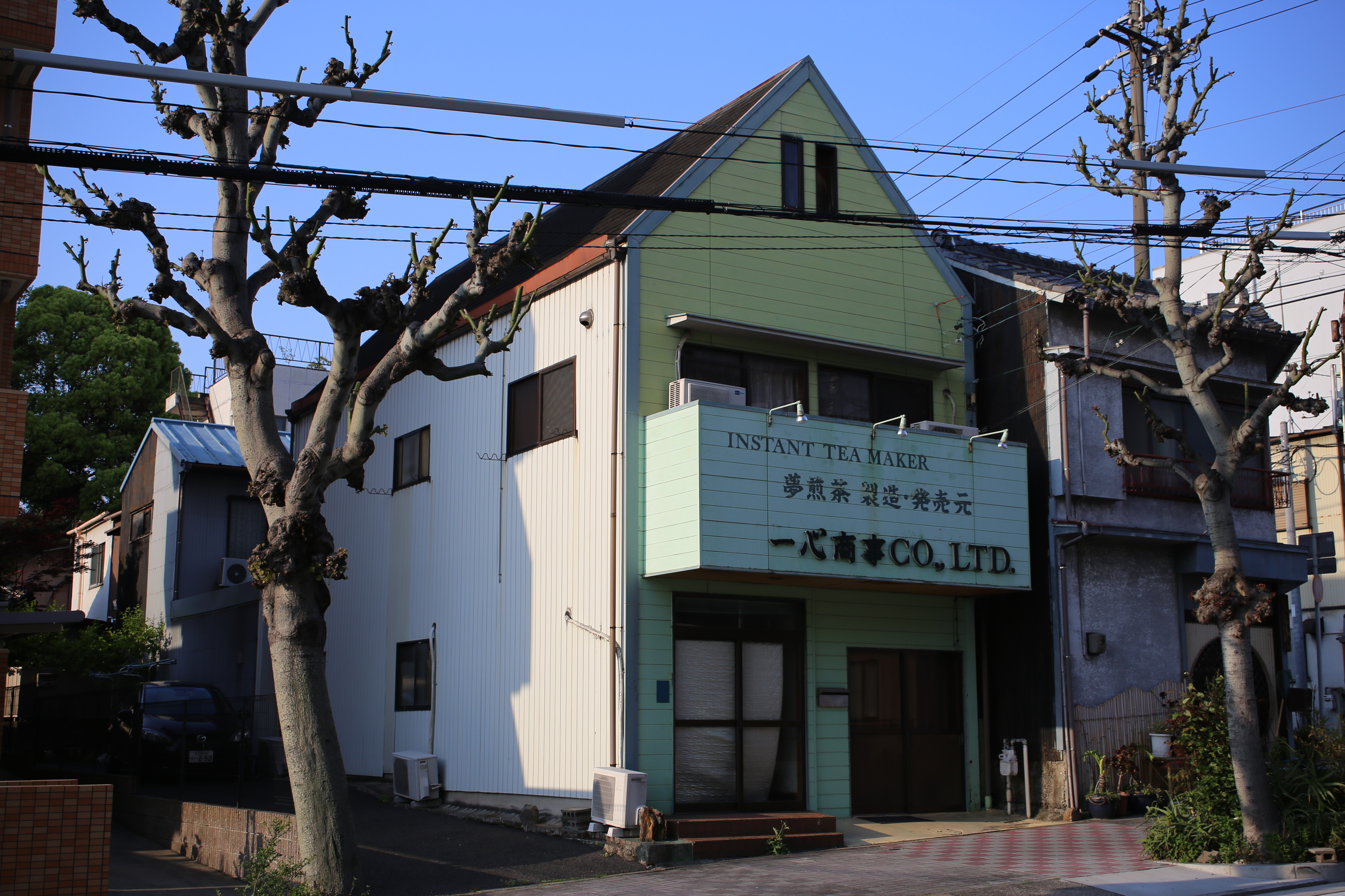 名古屋市中区松原の一心商事旧本社を南側公道西側より撮影。